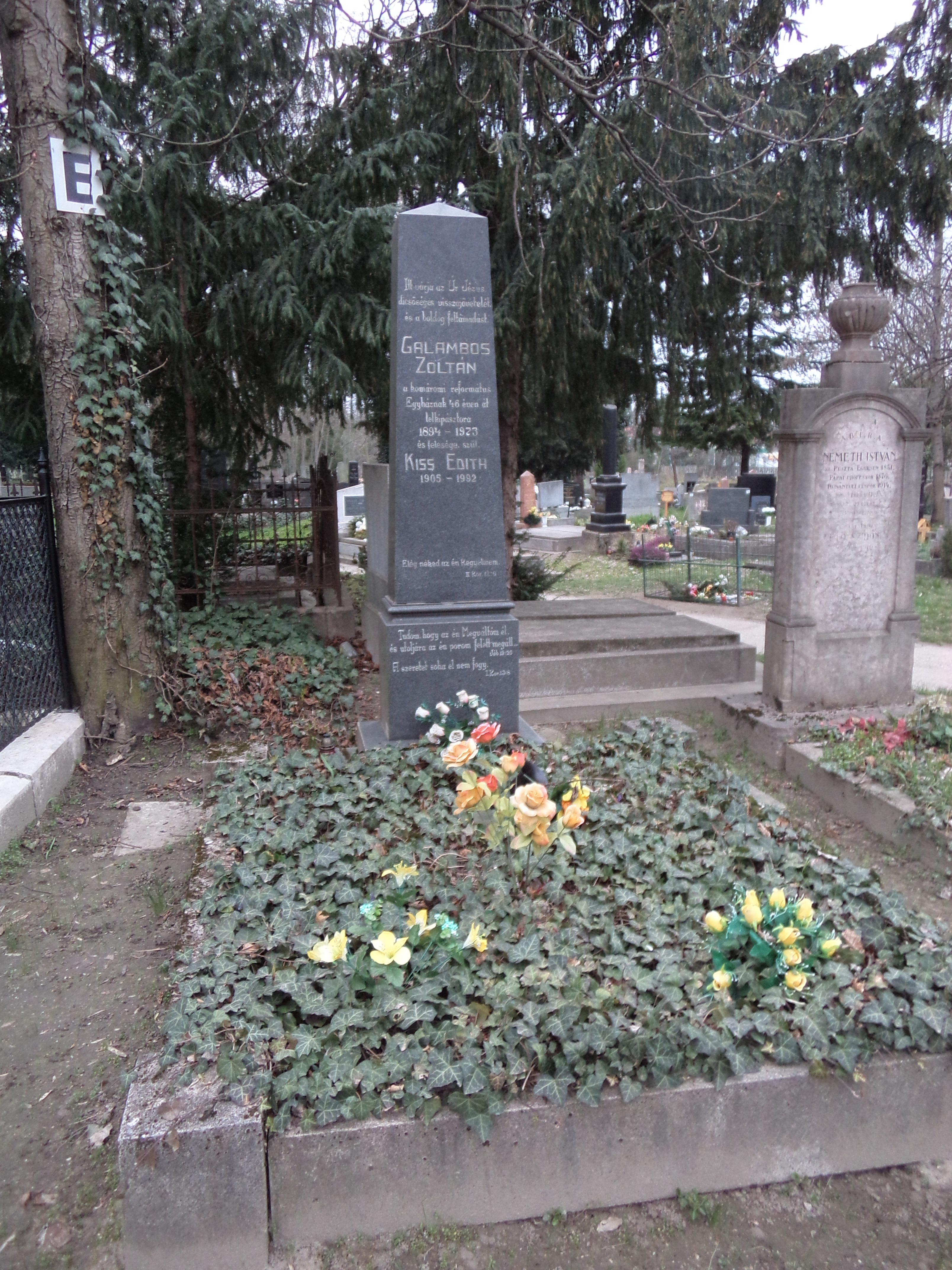 Galambos Zoltán - Komáromi temető